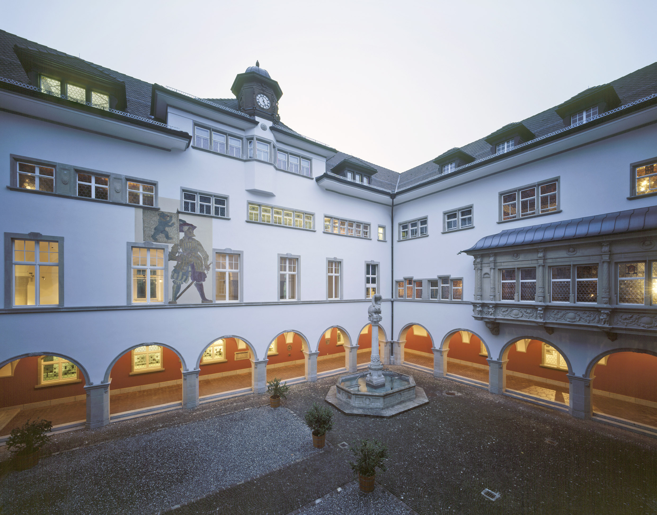 Innenhof des Museum, oft für Gesellschaftsanlässe verwendet